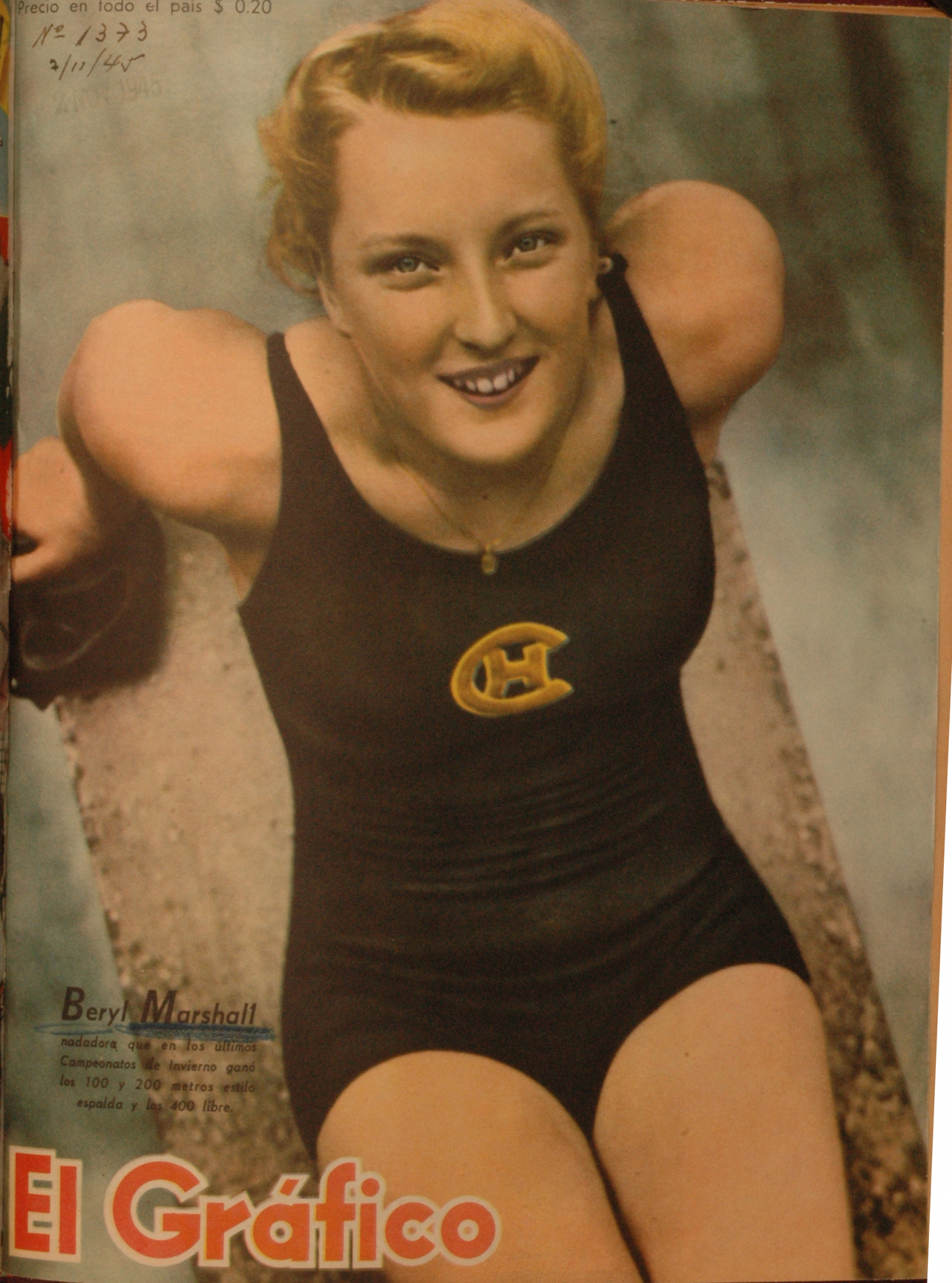 El Grafico del 02 de Noviembre de 1945. Edicion 1373